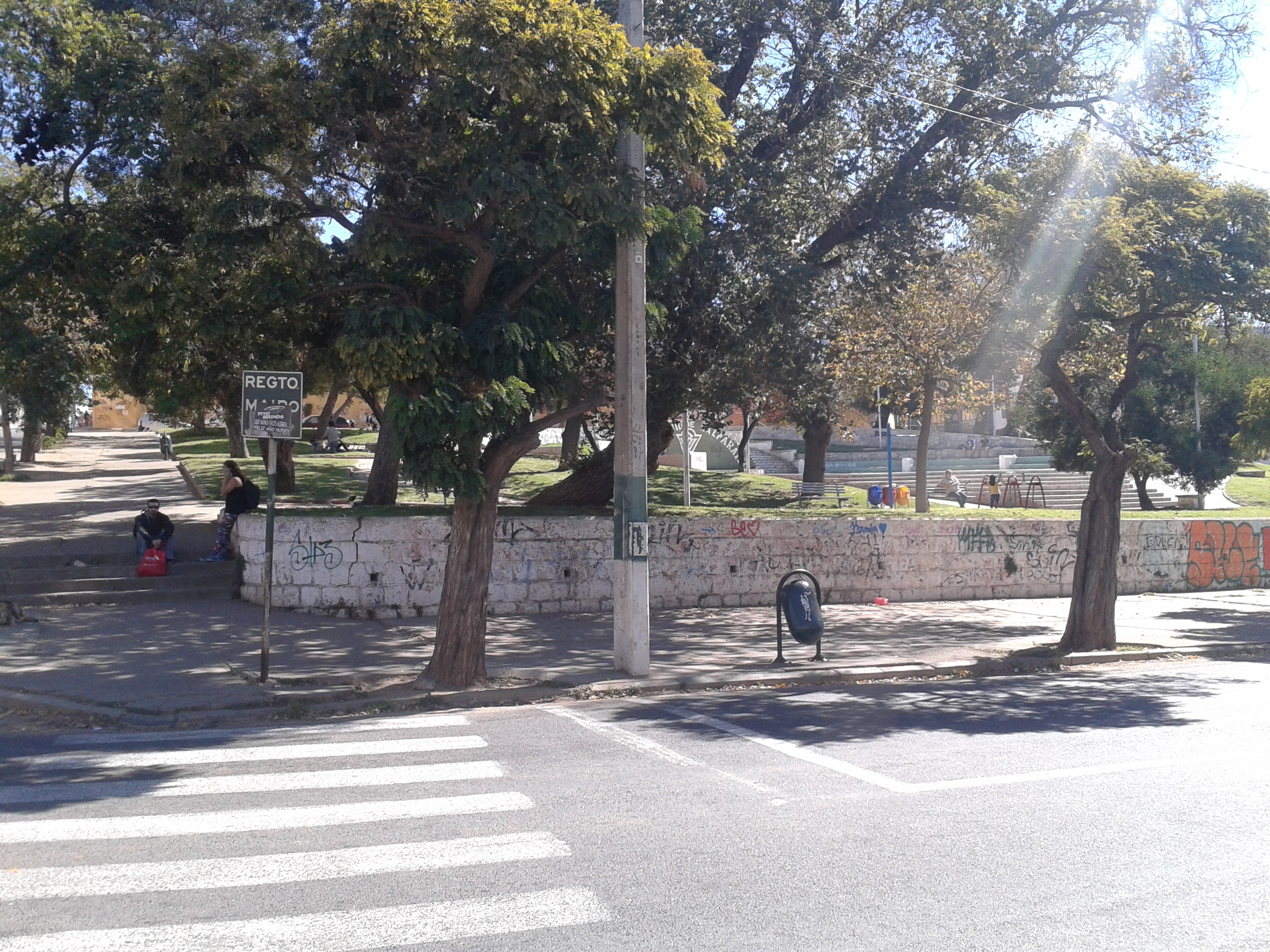 Plaza Waddington de la Av. Gran Bretaña en el Cerro Playa Ancha de Valparaíso